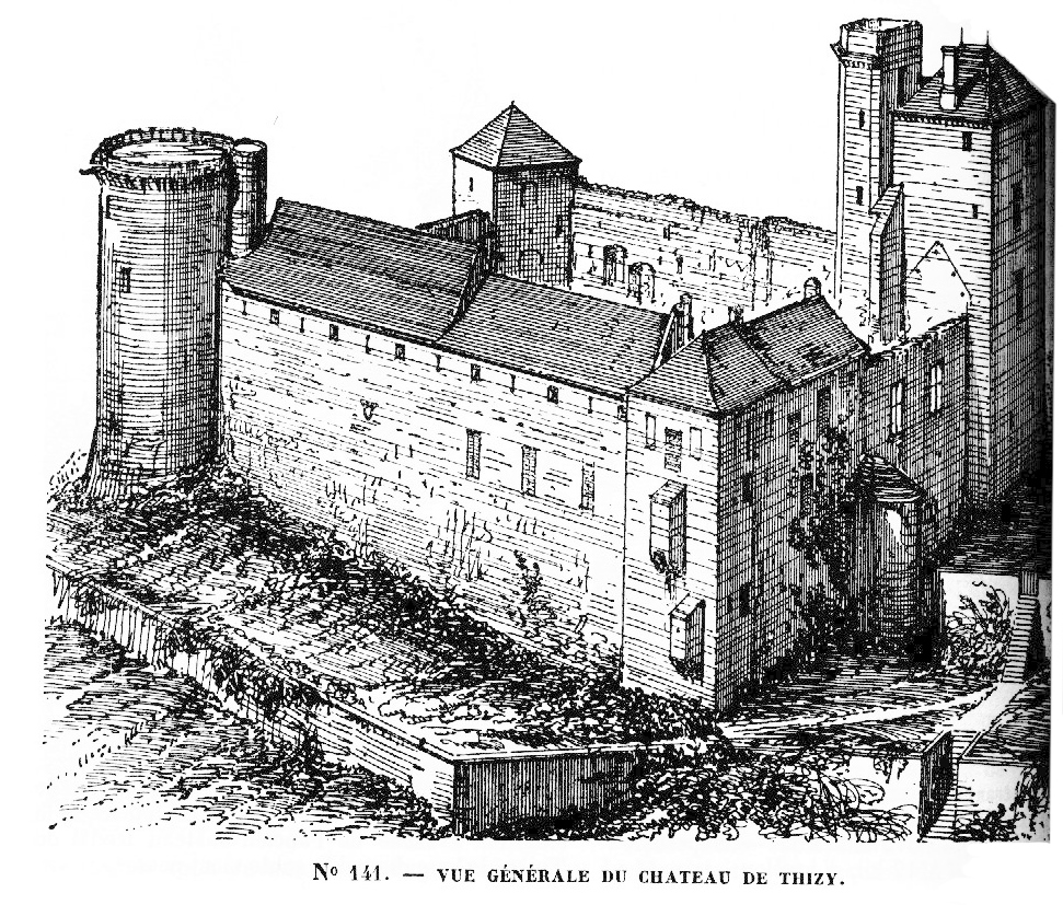 Dessin du château de Thizy (Yonne)